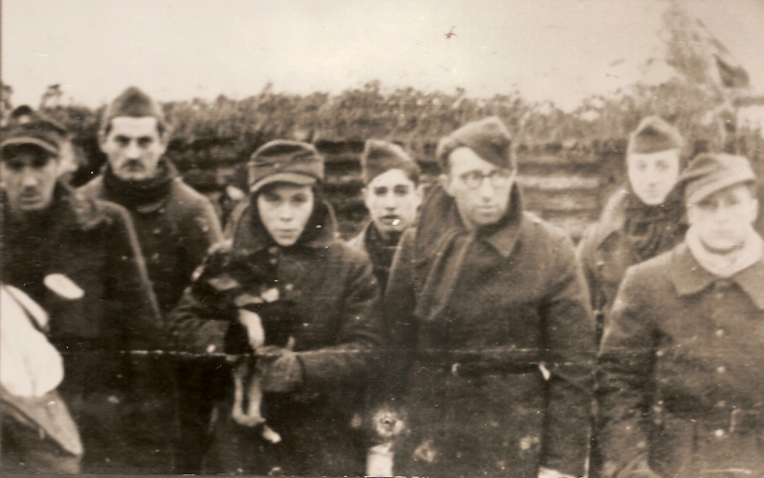 "Osa" i Francuzi. 3 Wileńska Brygada AK